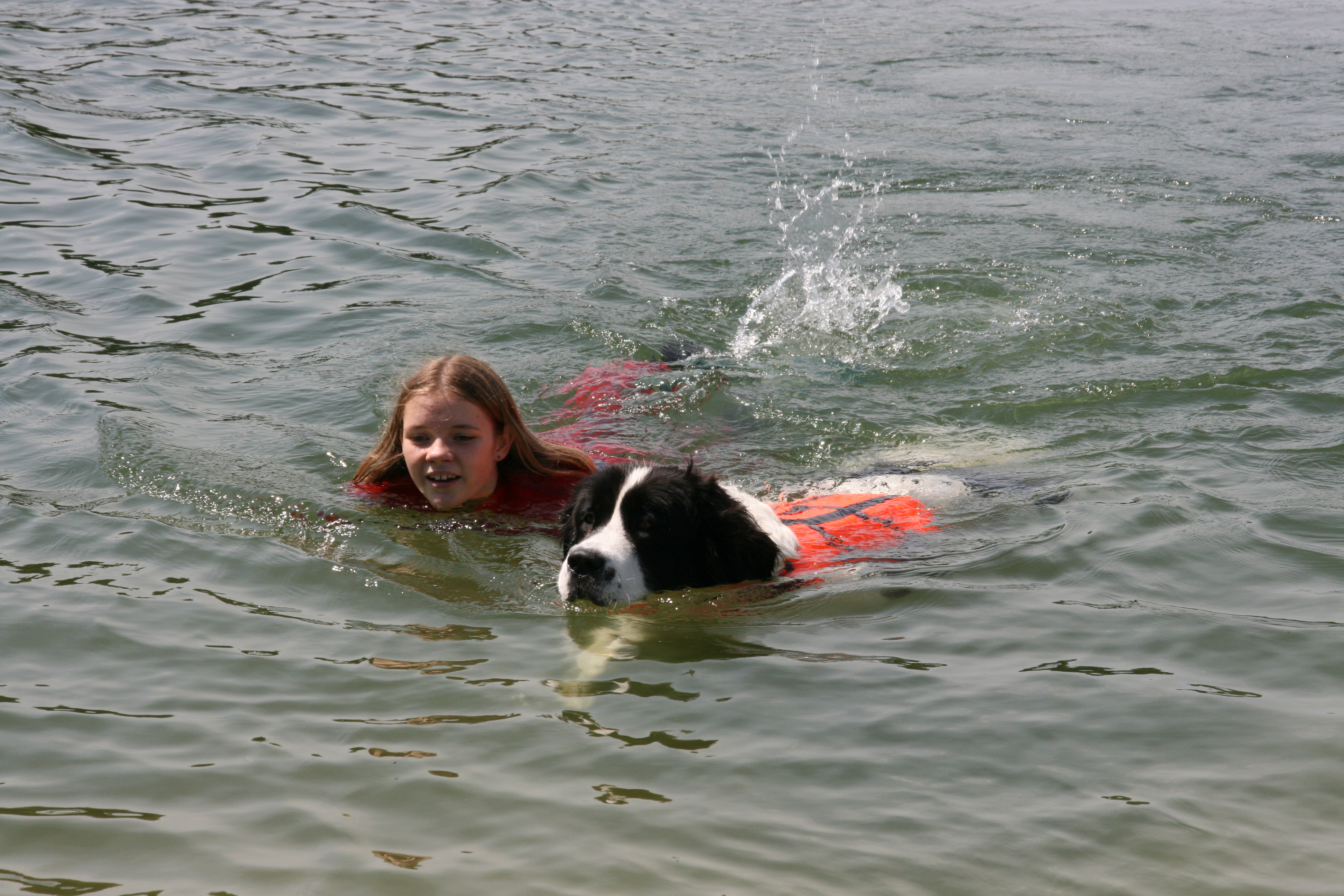 Wasserarbeit, hier Teamschwimmen Hund – Mensch